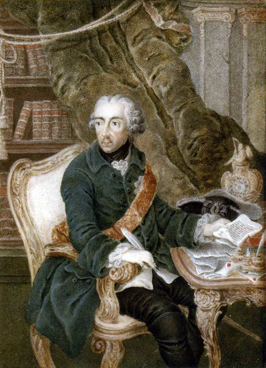 Friedrich II. in seiner Bibliothek. Stiftung Preußische Schlösser und Gärten, GK I 41275